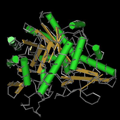 une chaîne de la lactase